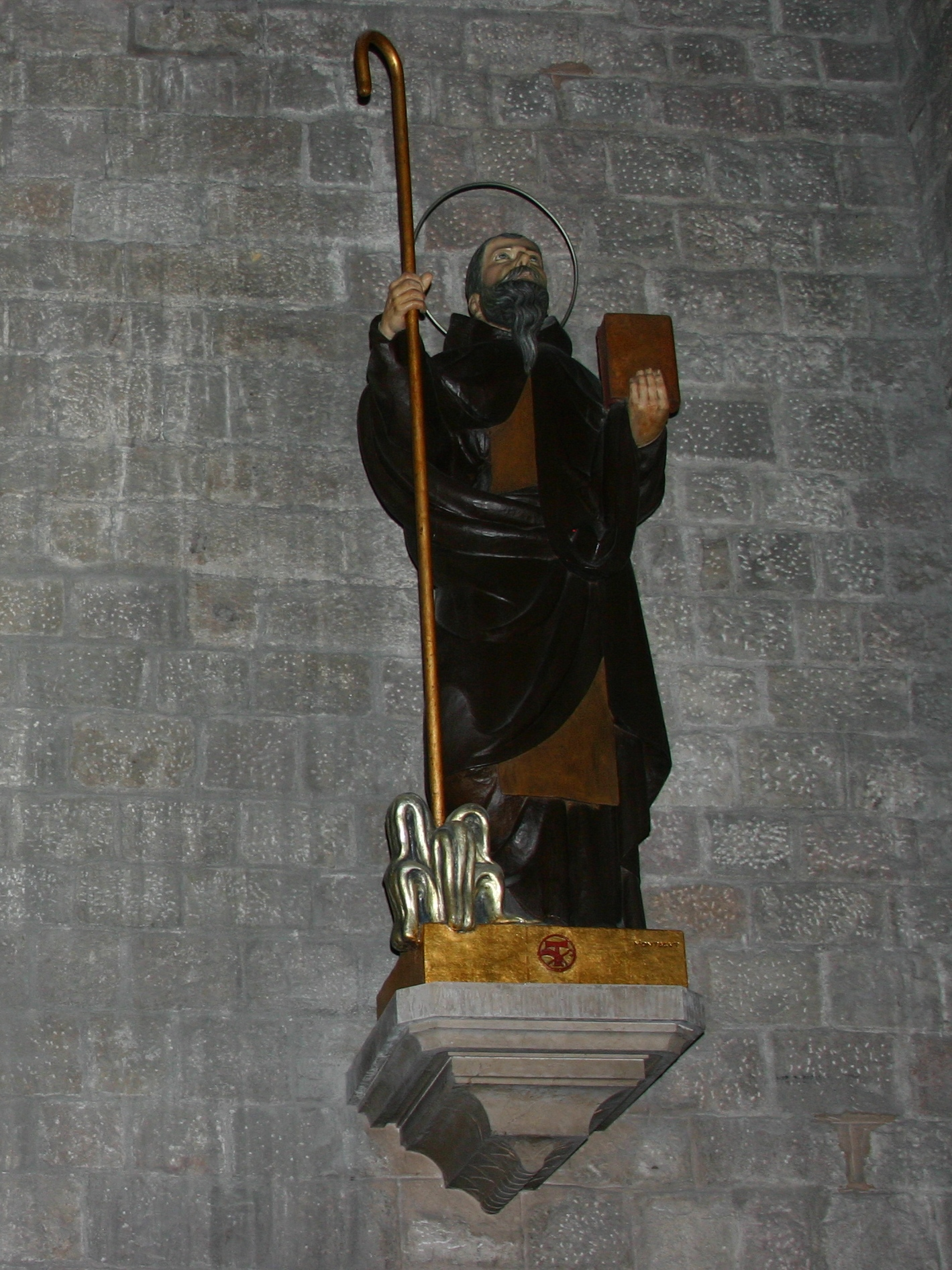 Interior da Basílica de Santa Maria del Mar